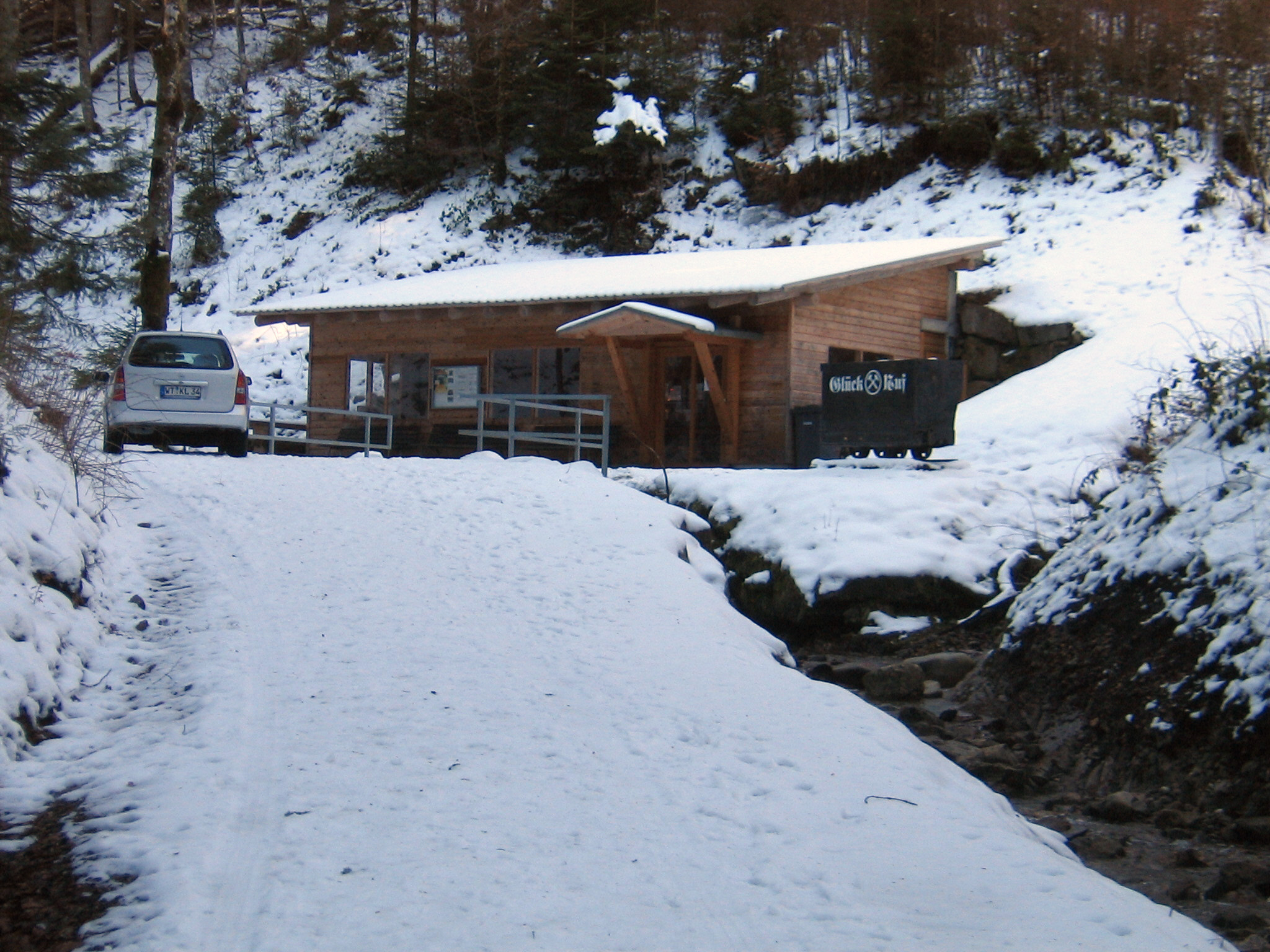 Stolleneingang Hoffnungsstollen Todtmoos